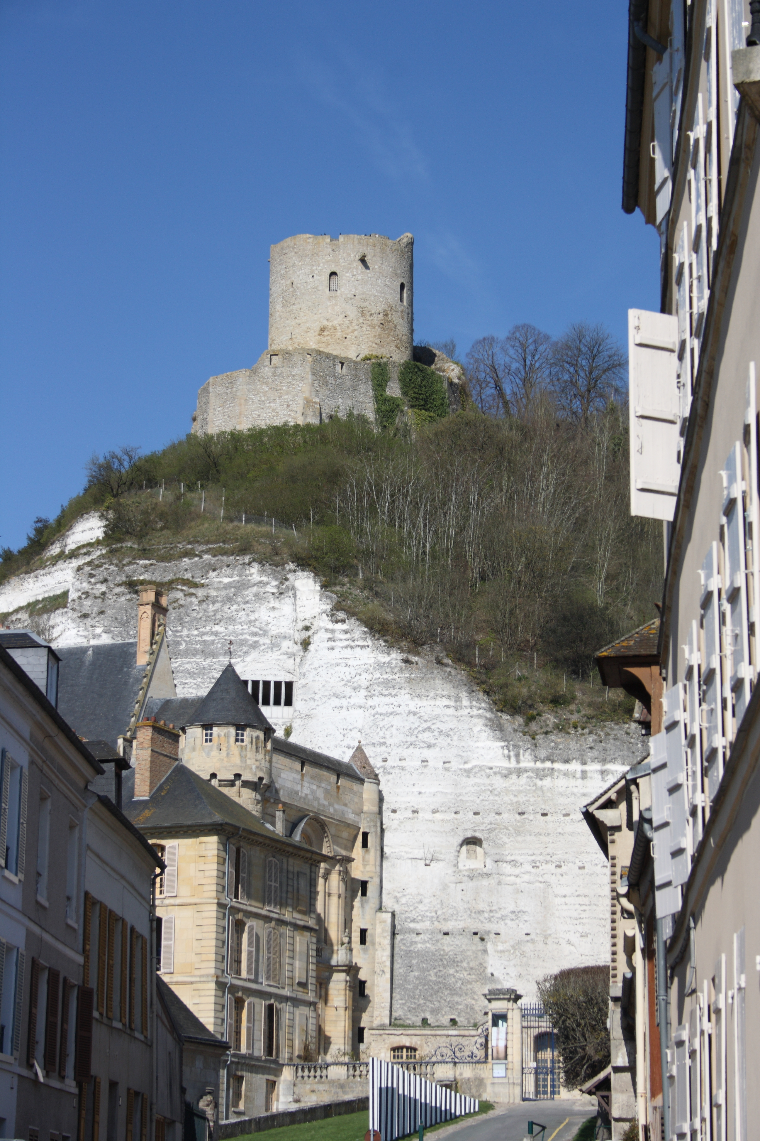 Donjon des Schlosses in La Roche-Guyon